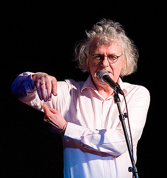 Per Inge Torkelsen